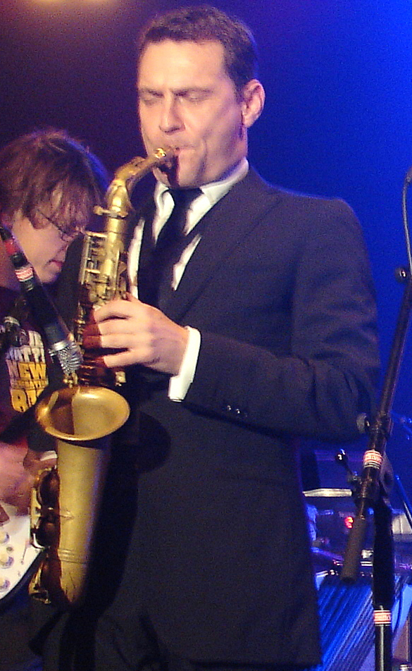 Benjamin Herman with New Generation Big Band - Melkweg, Amsterdam